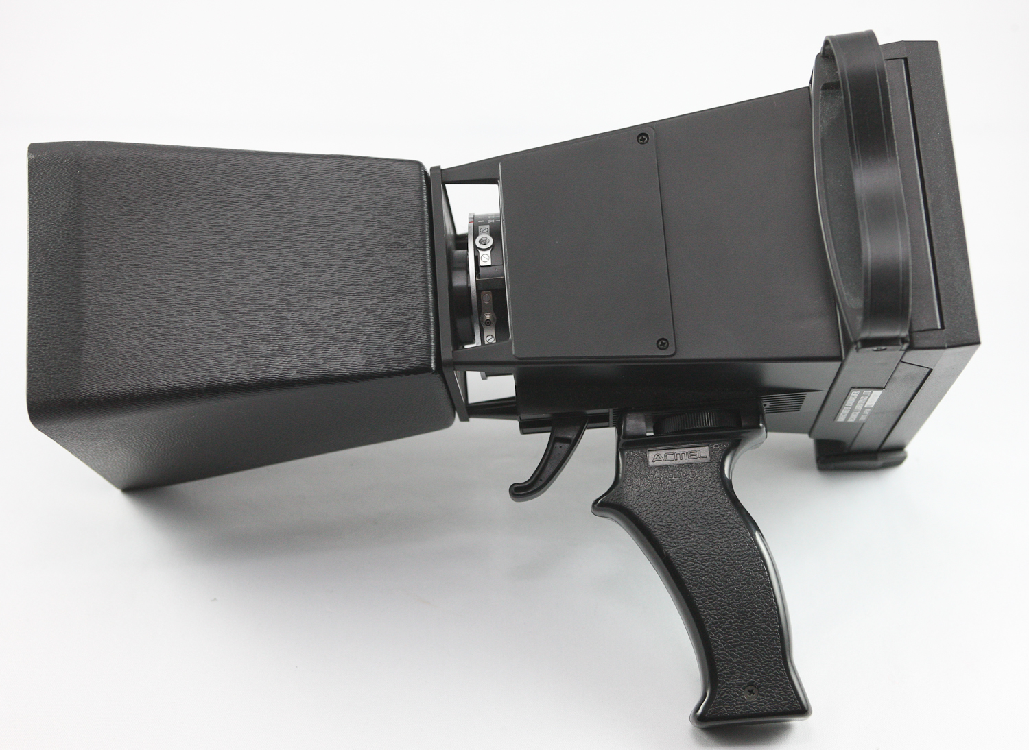 0396 ACMEL CRT Camera M-085D